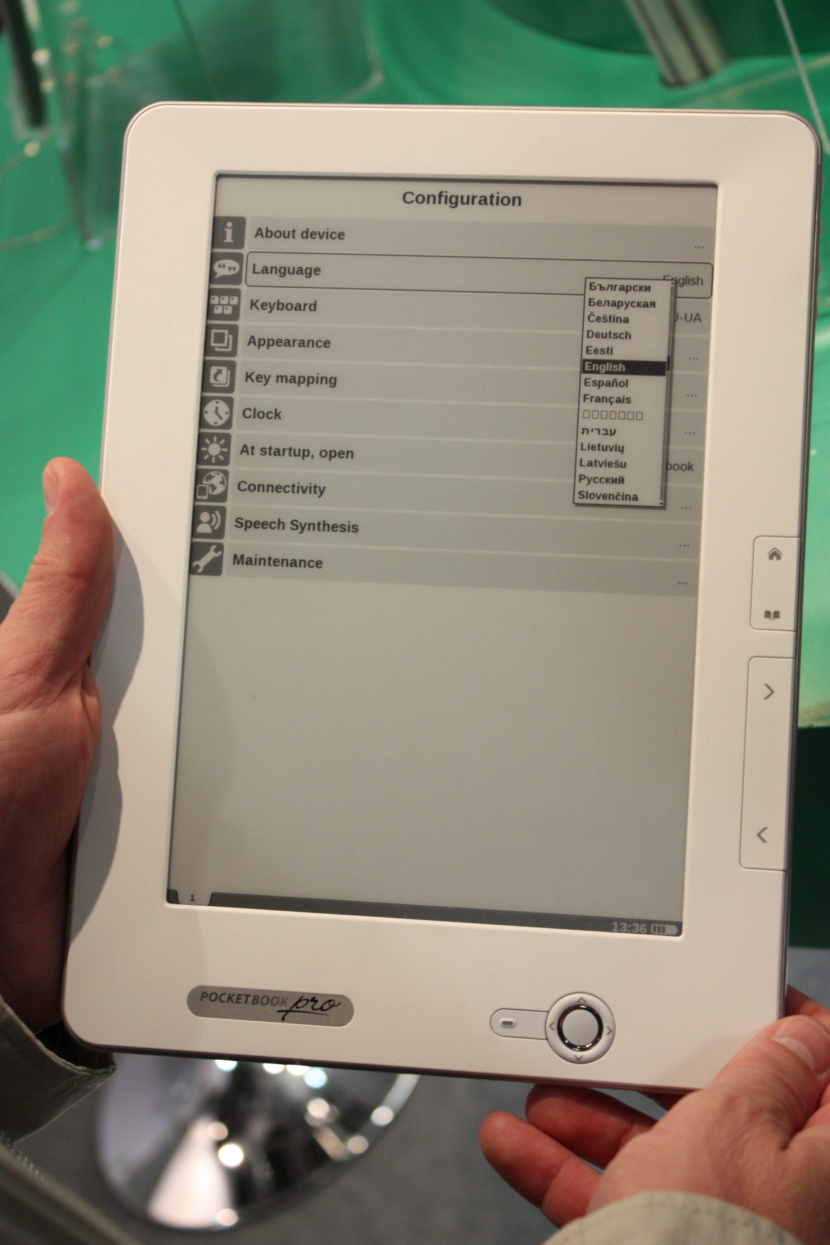 IFA 2010, Berlin